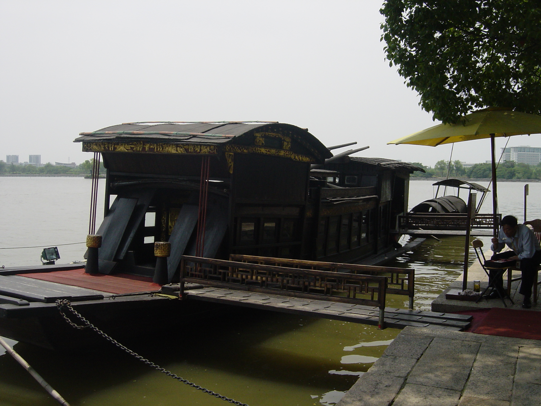 中文（中国大陆）: 浙江省嘉兴市南湖红船。